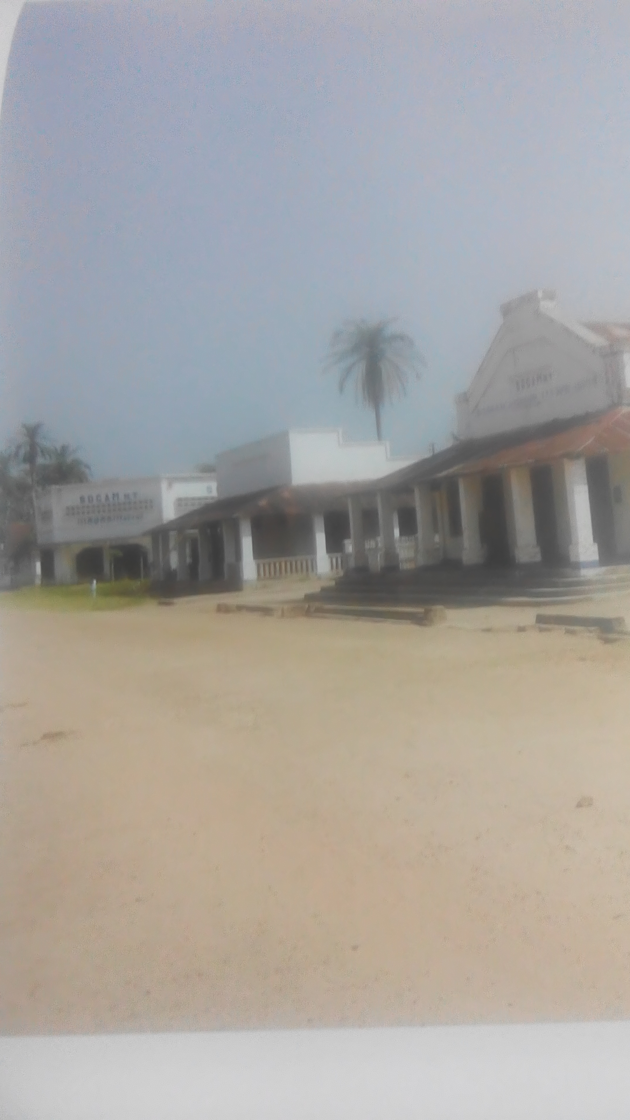 Bureau administratif dans le territoire d'Aketi au Bas-Uele. Bureaux et quelques maisons dans le centre des affaires du territoire d'Aketi